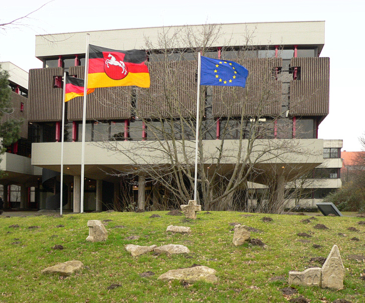 Gottfried Wilhelm Leibniz Bibliothek in Hannover